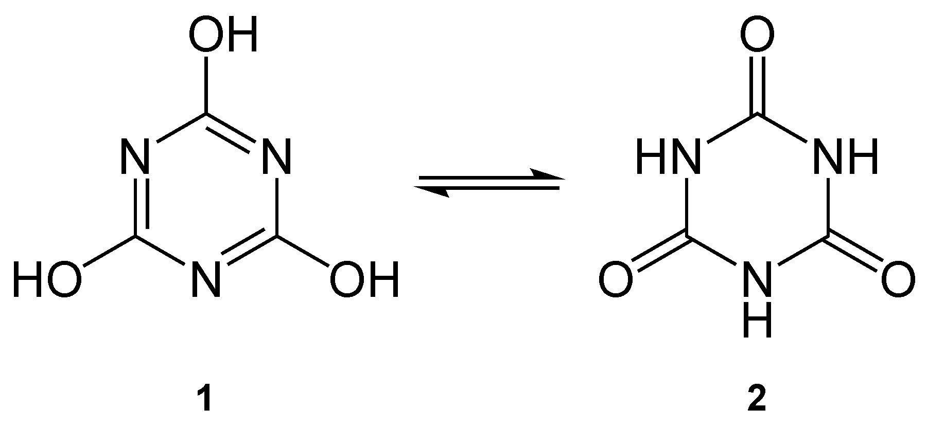 Cyanursäure